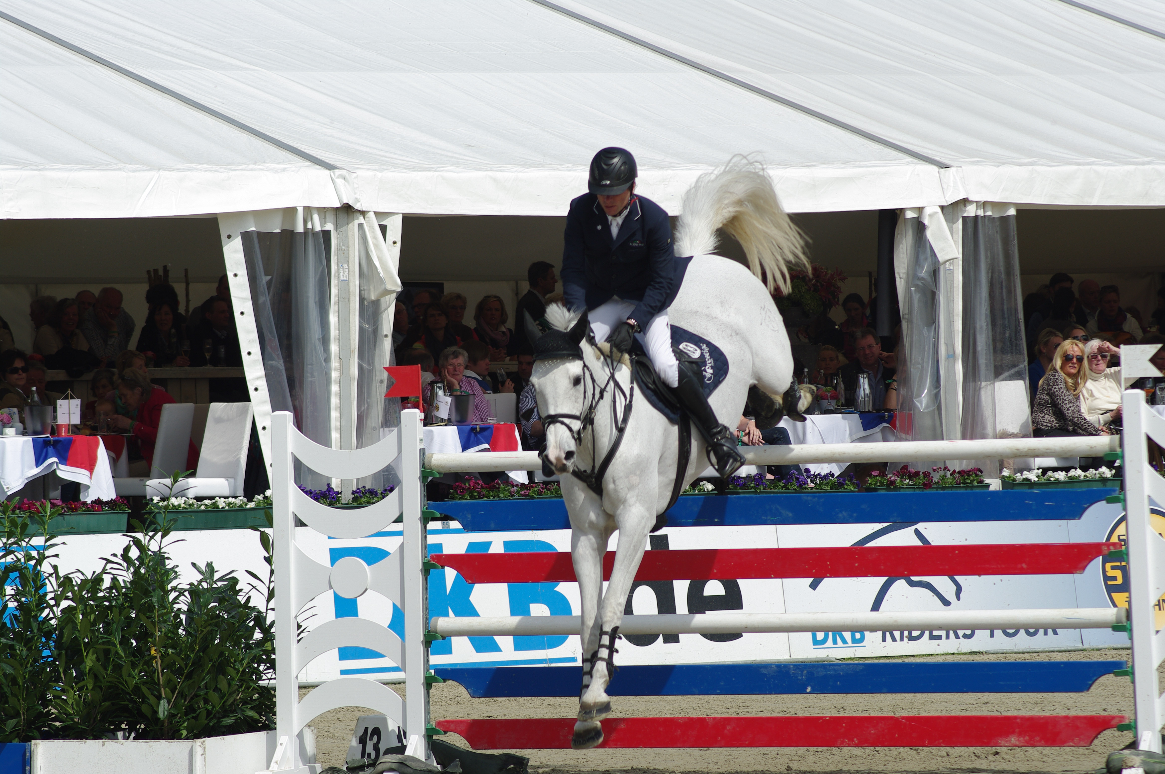 Horses & Dreams 2013: Carsten-Otto Nagel mit Corradina 2